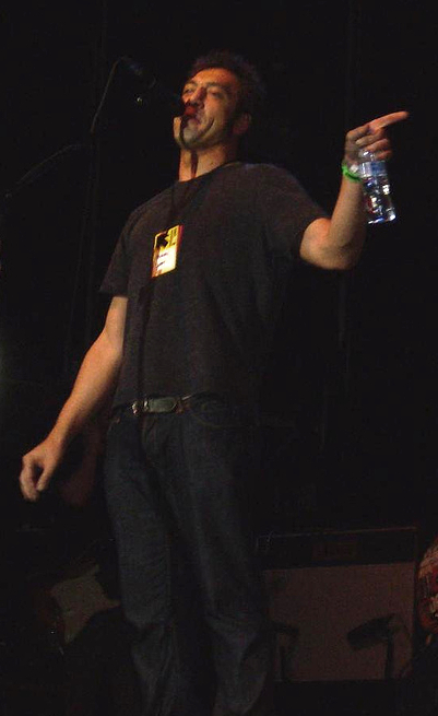 Javier Bardem, Festimad 2007